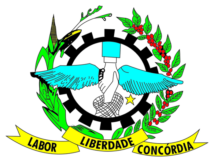 Brasão de Armas do município paranaense de Ivaiporã, Brasil.